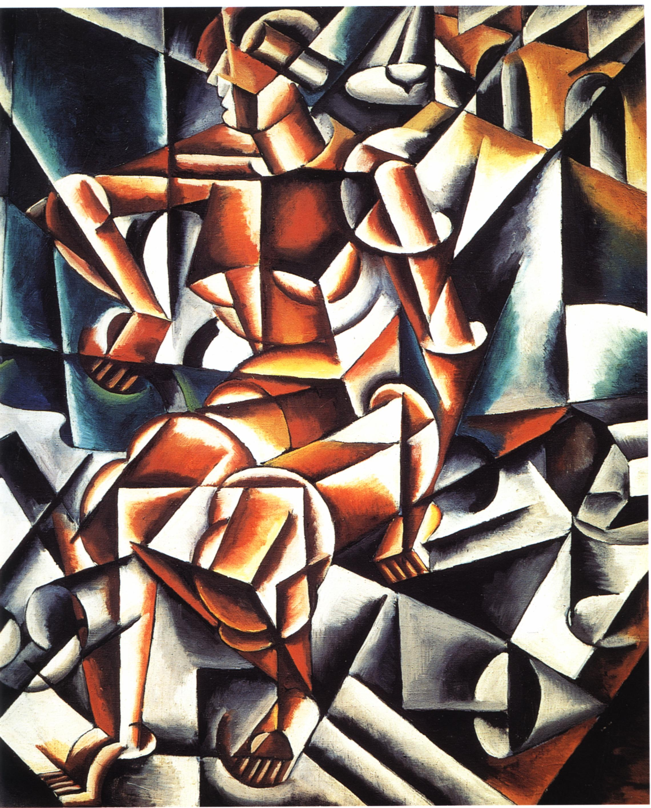 Figura + Casa + Spazio, olio su tela, 125 x 107 cm., Museo di Stato russo, Pietroburgo